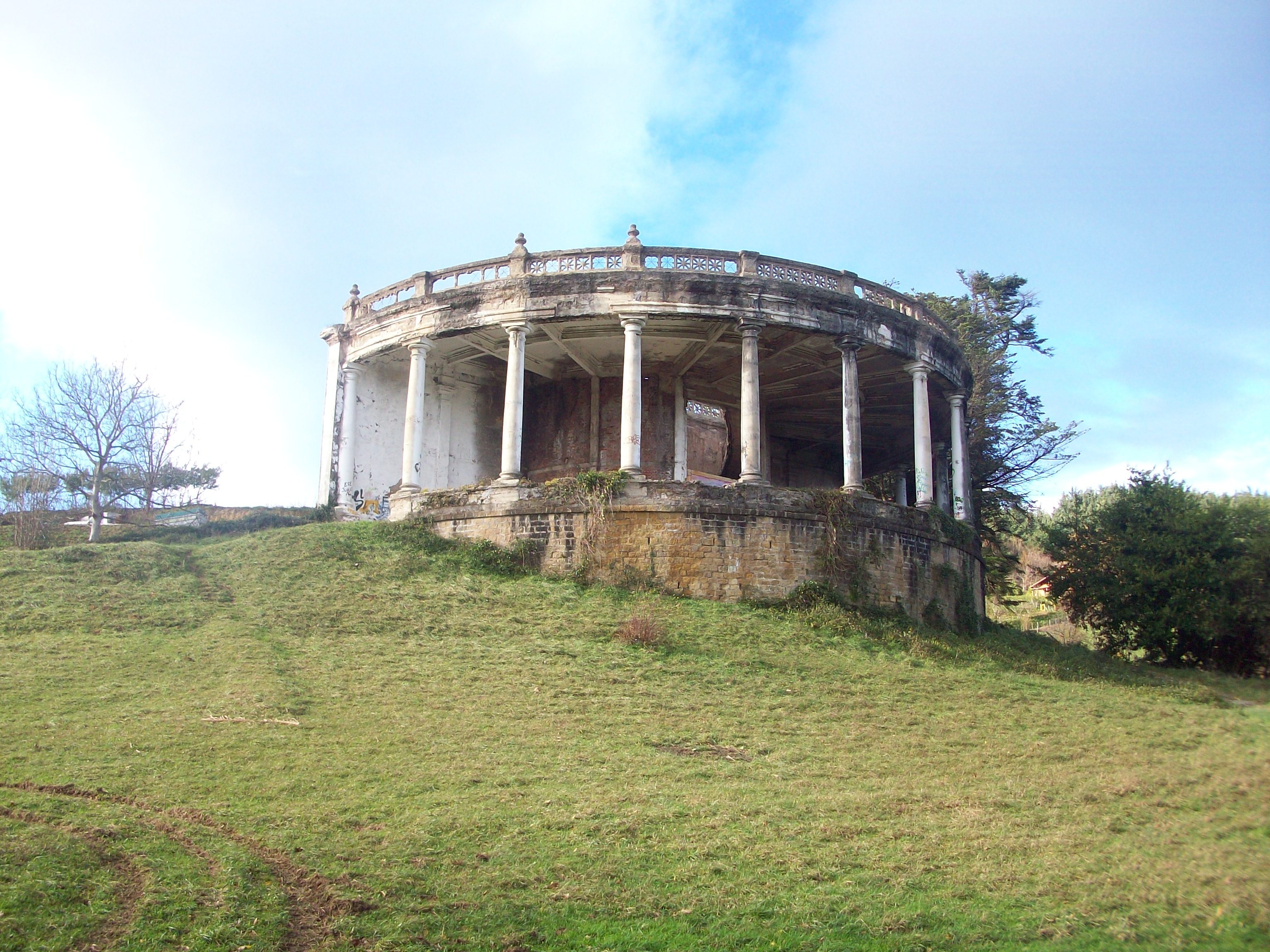 Zarauzko Vista Alegre parkeko Torreoia. Gipuzkoa, Euskal Herria.